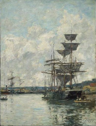 Ships_at_Le_Havre. 27.94 x 35.56 cm.